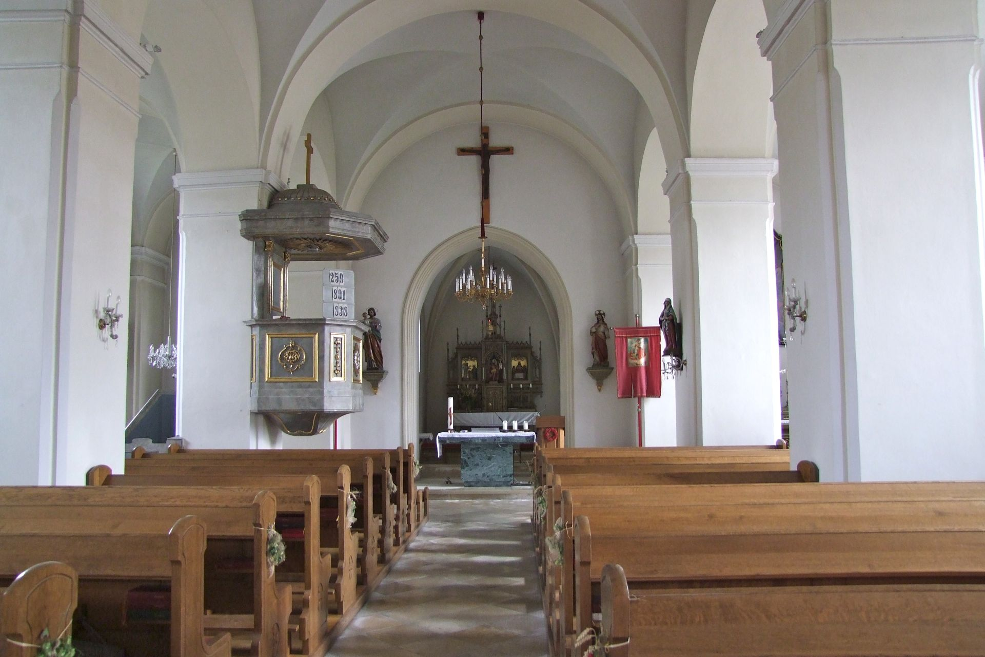 Kath. Pfarrkirche hl. Pankraz